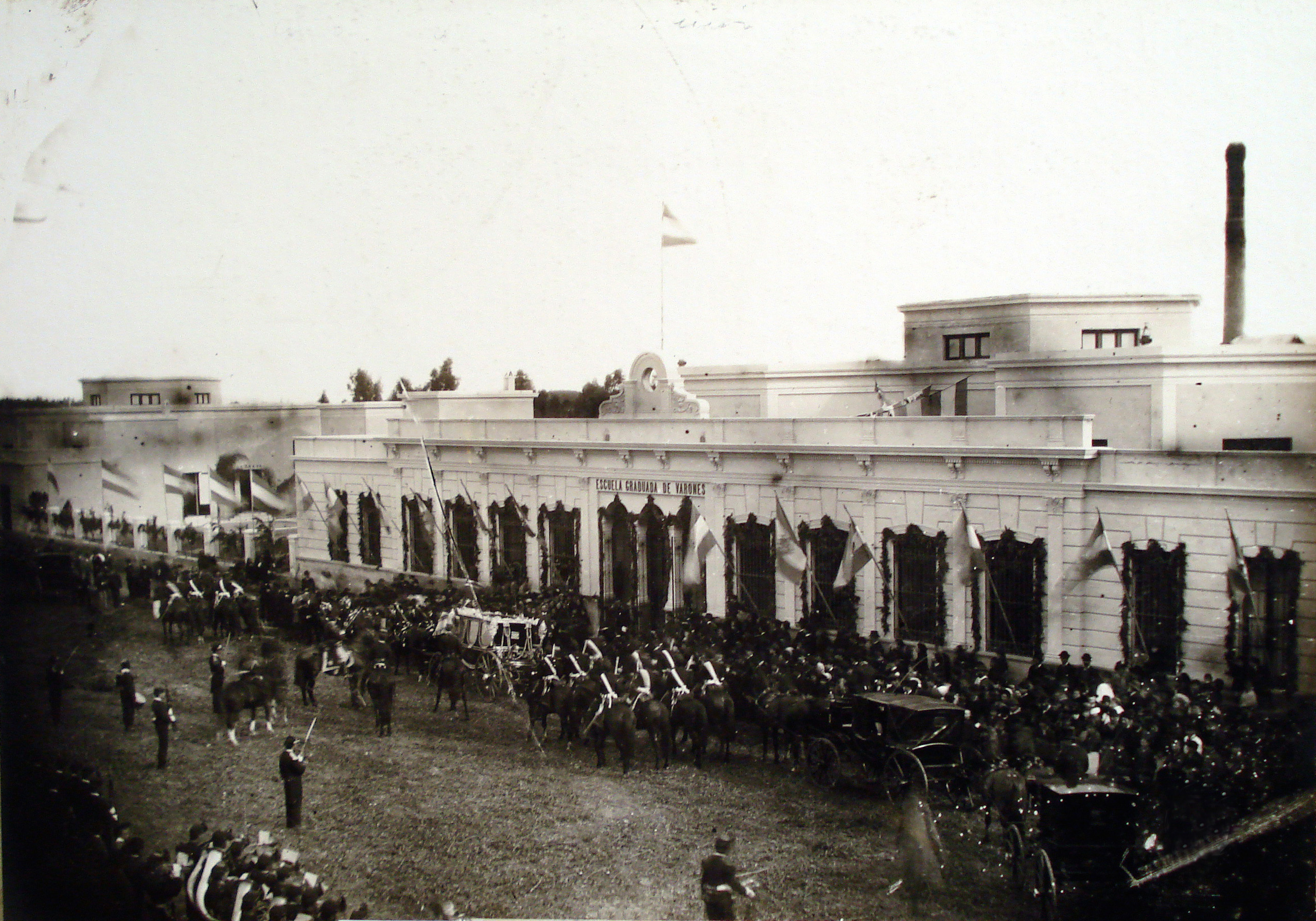 El Presidente Julio A. Roca y sus ministros llegan al acto de inauguración de las primeras catorce Escuelas Graduadas y Elementales de Varones y Señoritas, en la ciudad de Buenos Aires. Construidas por el Consejo Nacional de Educación, y como parte de la Ley 1420 de Educación General.